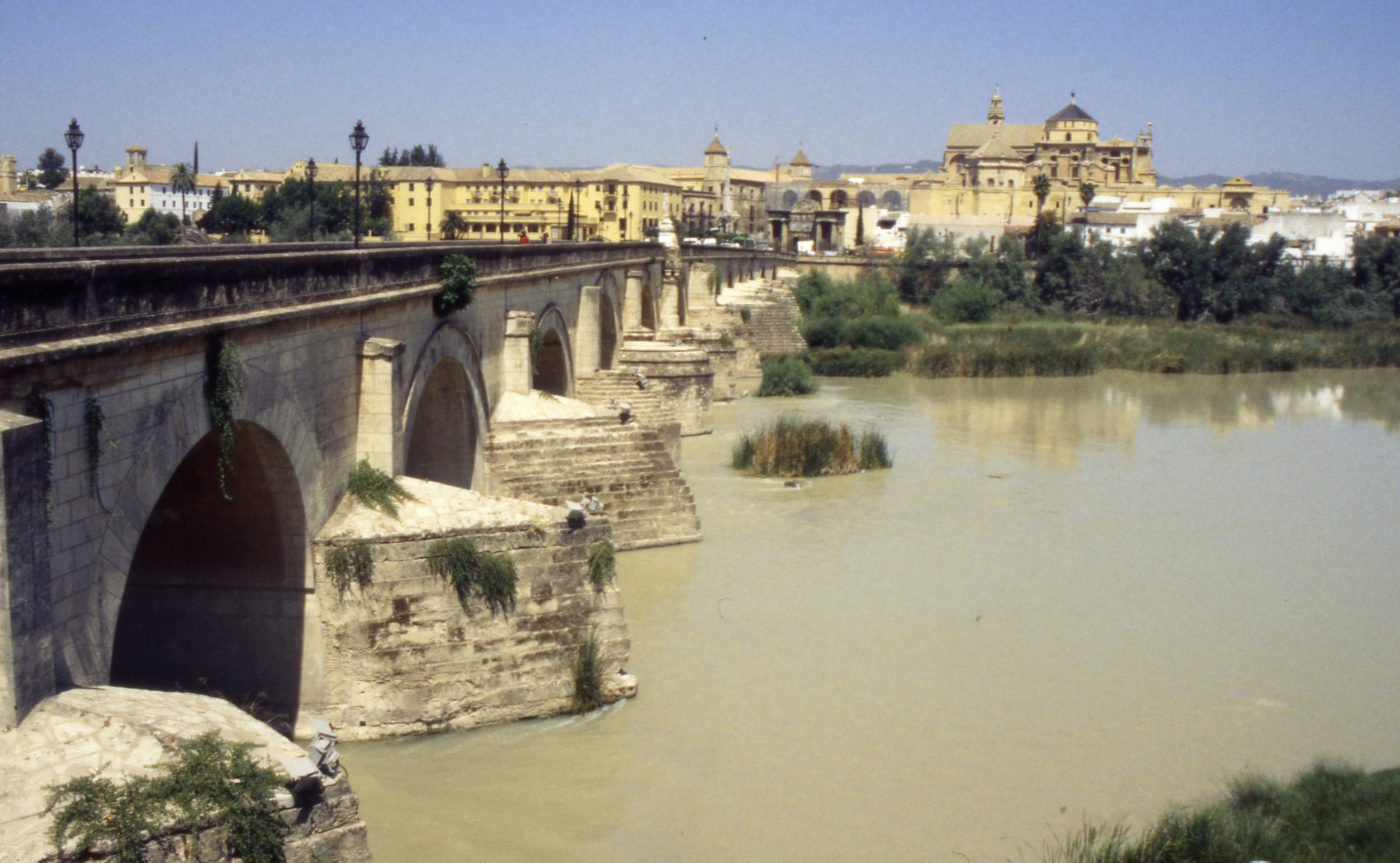 Cordoba Ansicht